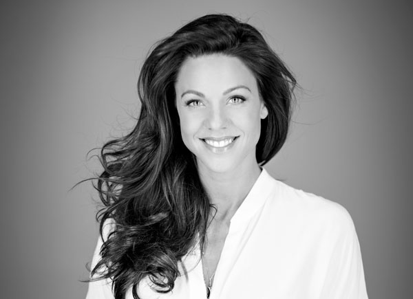 Kiki Maeder im Jahr 2015